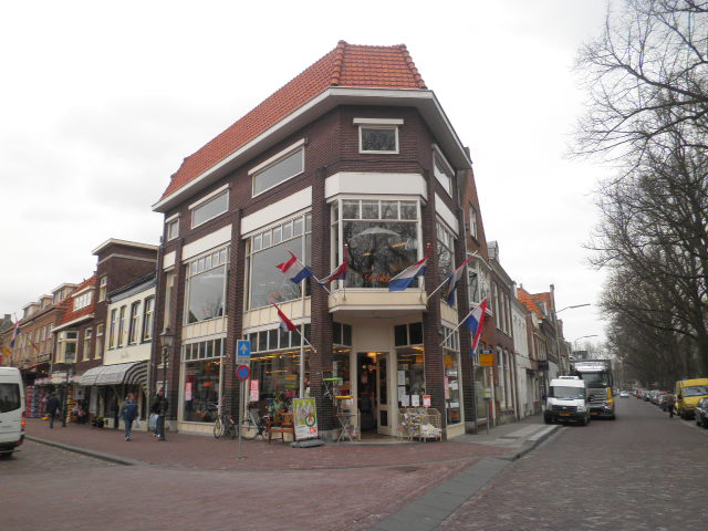 Winkelpand van de Blokker in Hoorn. Sinds 1923 is dit een Blokkerfiliaal.